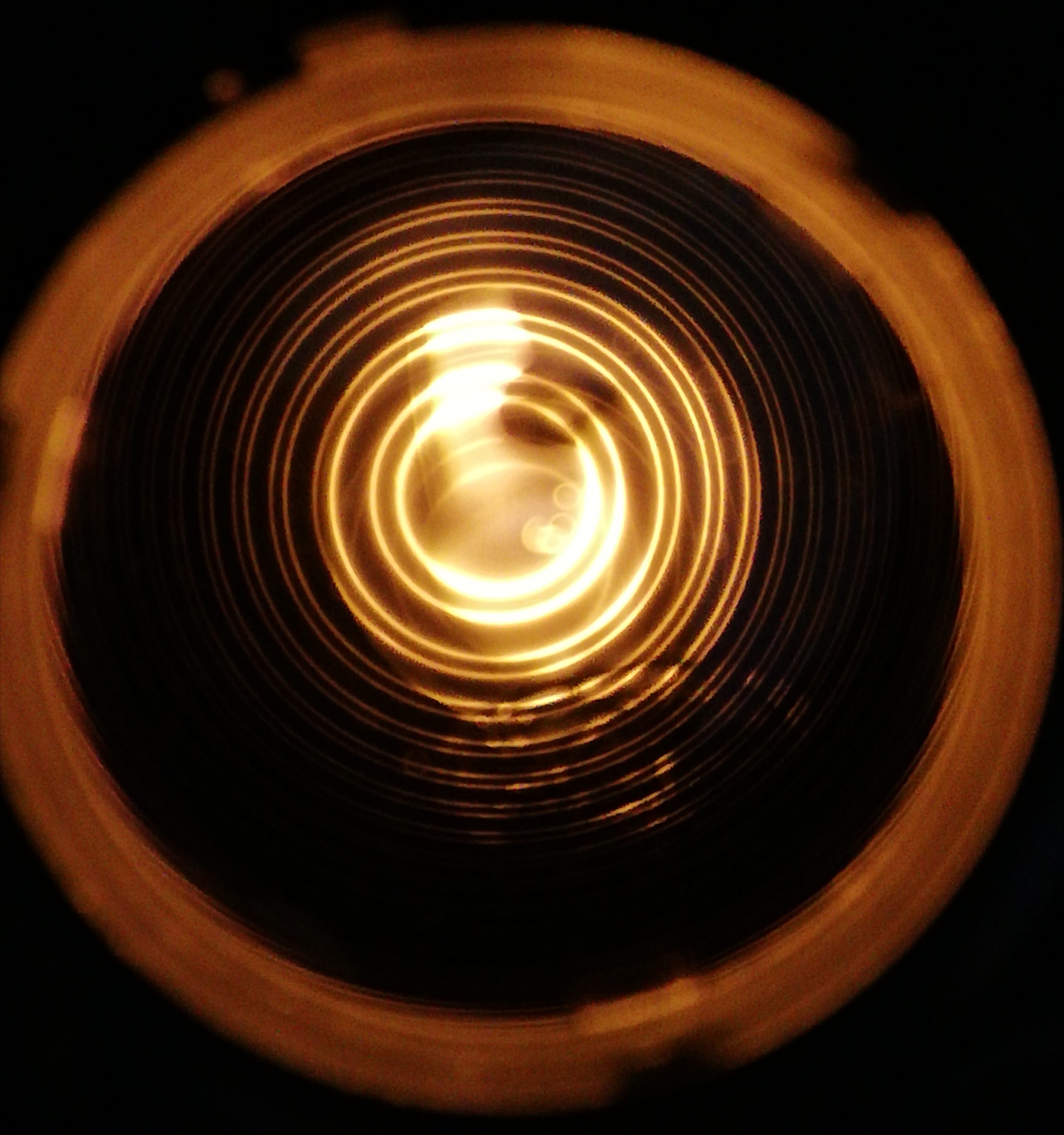 Cette photo montre la figure d'interférence produite par un interféromètre de Fabry-Perot d'une lampe à vapeur de Sodium. Le montage optique comprend une lampe à vapeur de Sodium, un condenseur, un interféromètre de Fabry-Perot.